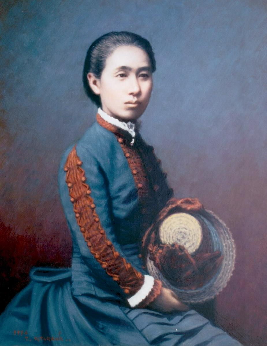 荻野吟子